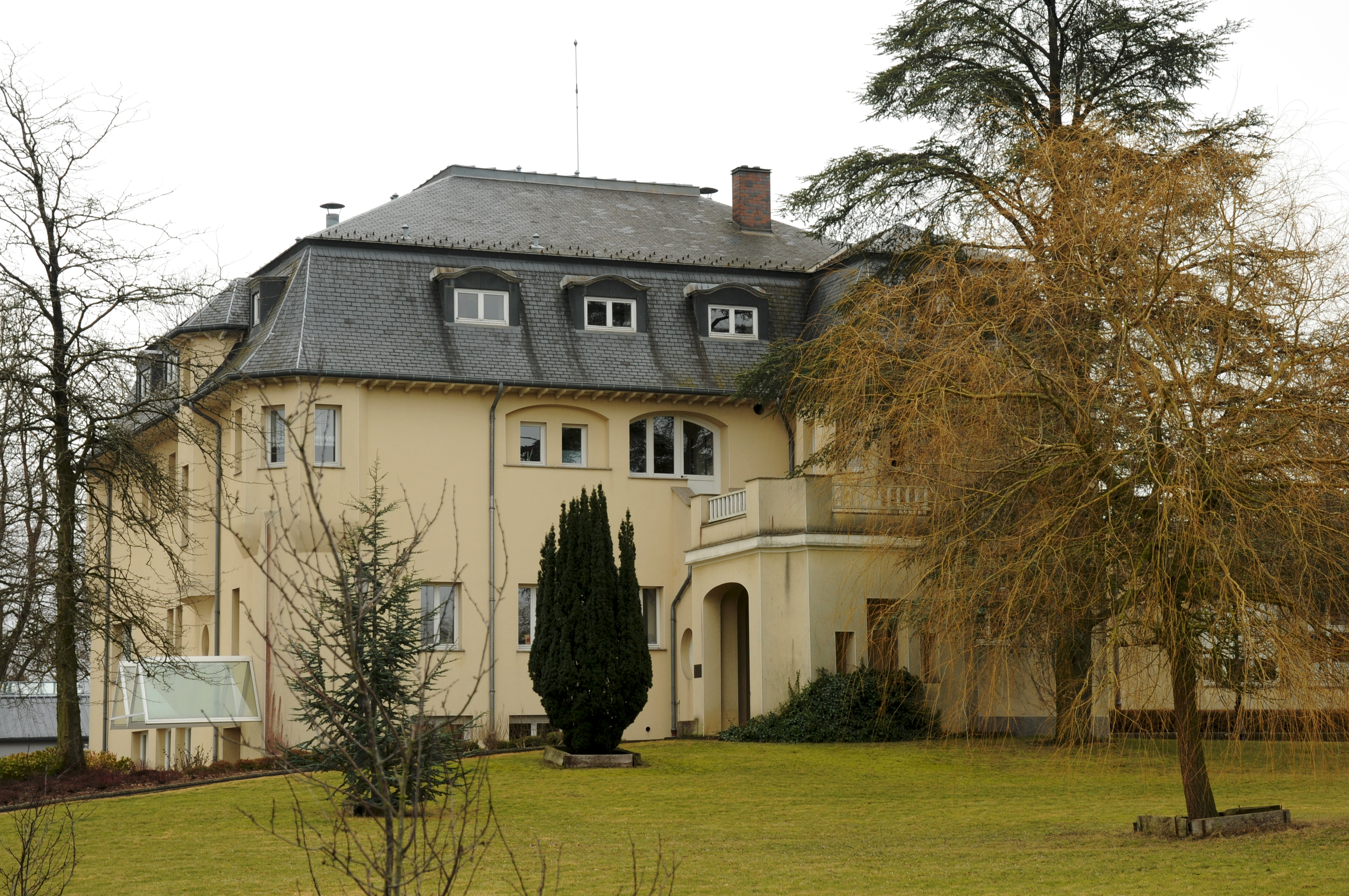 D'Verwaltungsgebai vun der Fondatioun Kräizbierg an der fréierer Direkteschvilla, dem Schlass vum Émile Mayrisch, zu Diddeleng.